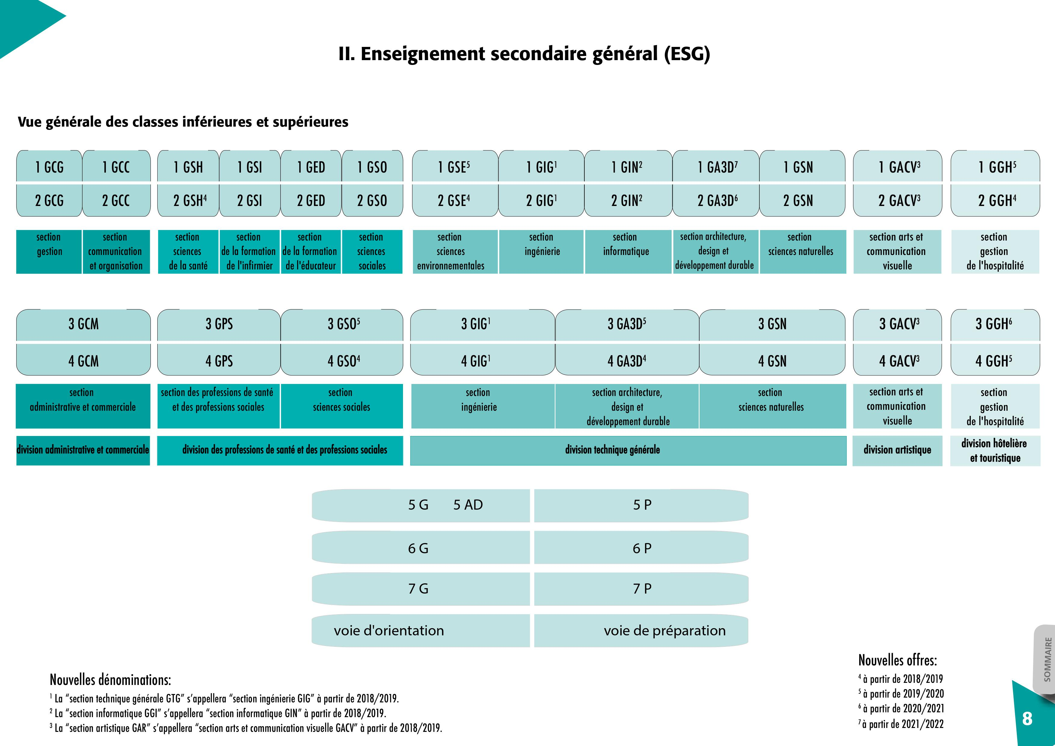 System scolaire de l'ESC (Luxembourg) à partir 2018/2019